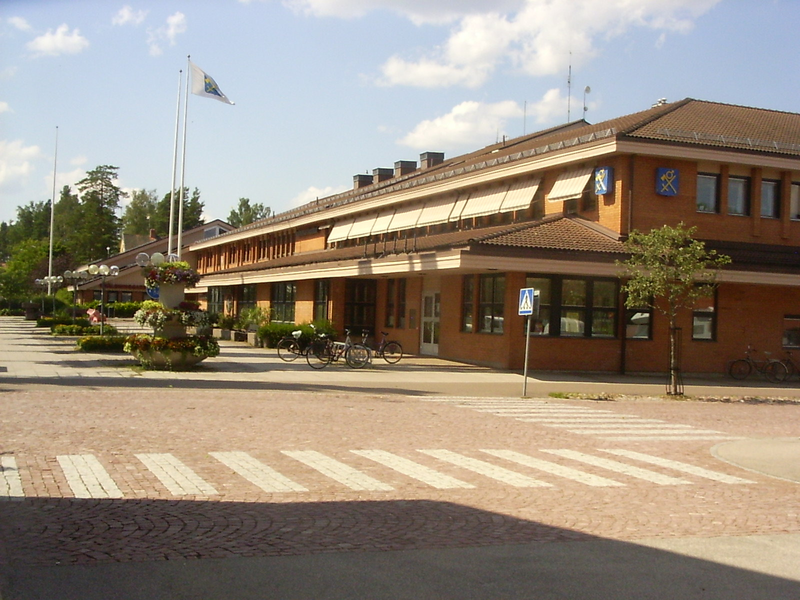 Vansbro, bibliotheek (en andere instellingen)